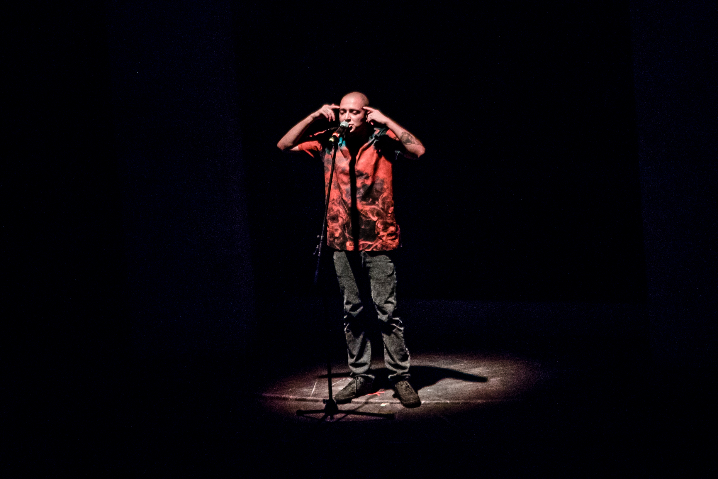 Выступление Oxxxymiron в Ледовом дворце Санкт-Петербурга 28 октября 2017 года